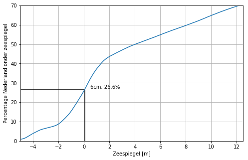 Naarmate de zeespiegel stijgt ligt een groter deel van Nederland onder de zeespiegel.